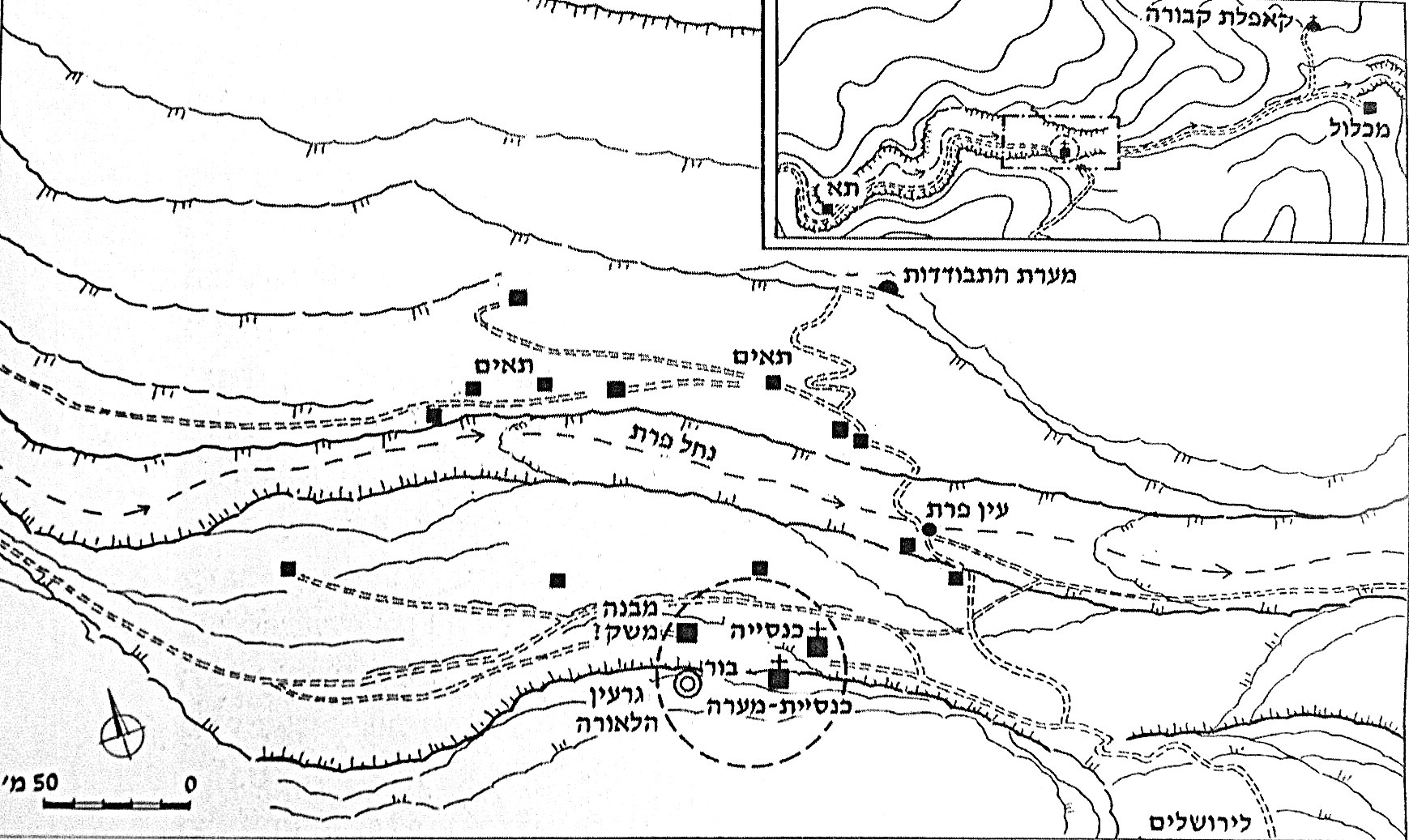 איור של לאורה פרן